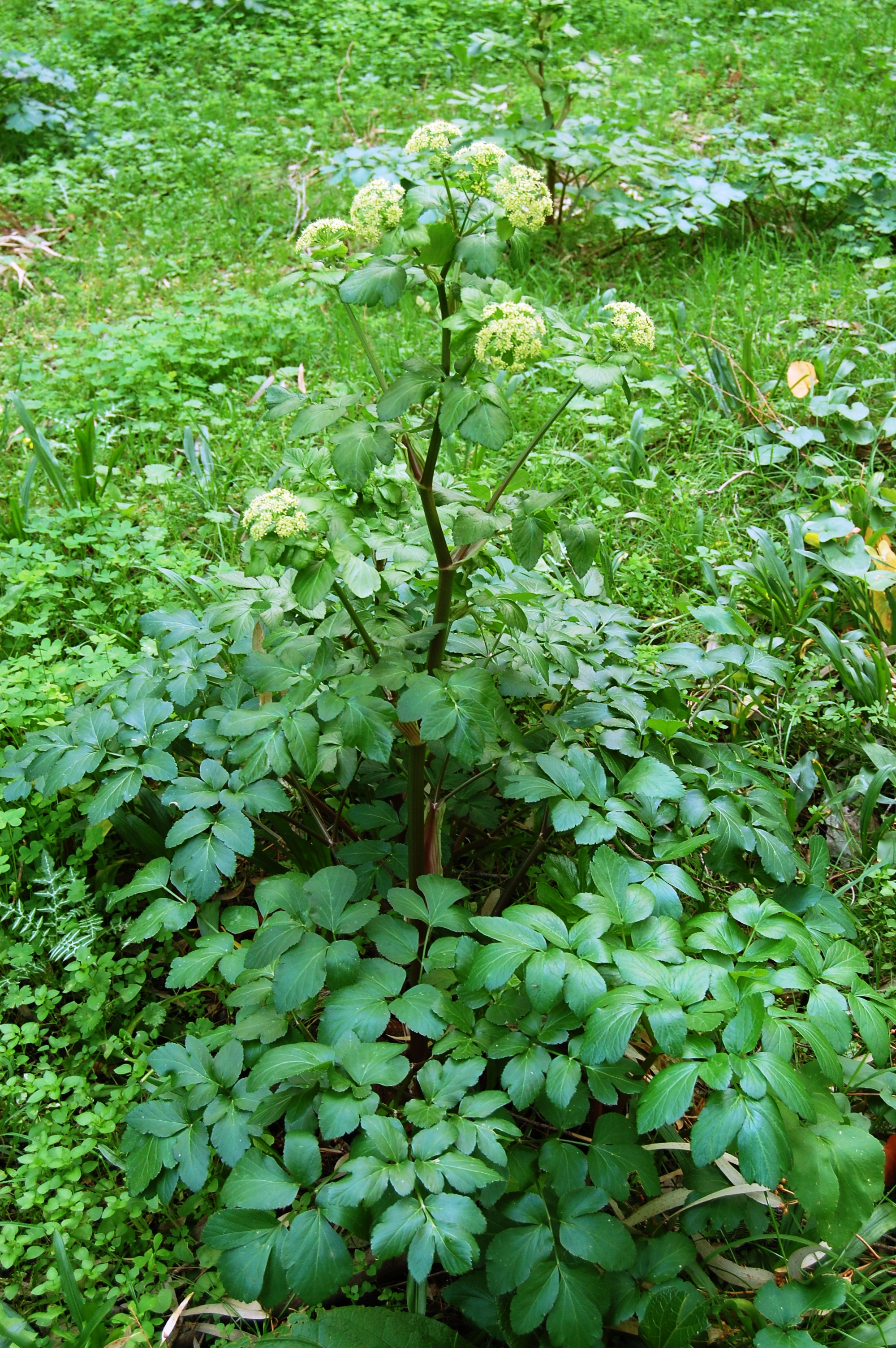 Smyrnium olusatrum Riserva naturale Monte Pellegrino